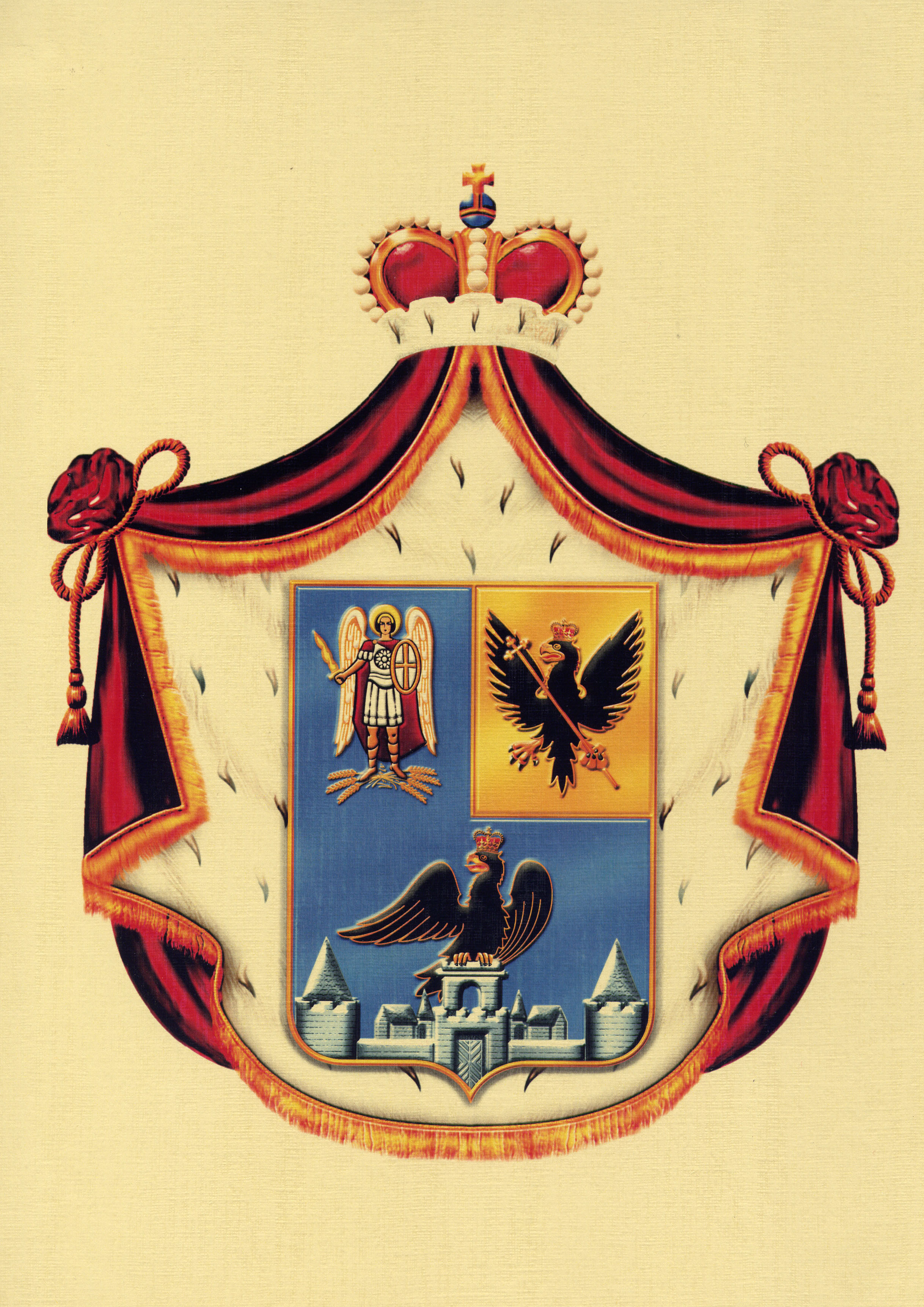 Герб князів Карачевських-Вовків: зліва — на блакитному тлі — Архангел Михаїл з мечем, стоїть на снопі з семи колосків пшениці; справа — на жовтому тлі — Чернігівський орел, що тримає Андріївський хрест; внизу — на блакитному тлі — герб Карачева: Чернігівський ореол стоїть на оборонних мурах міста Карачева.